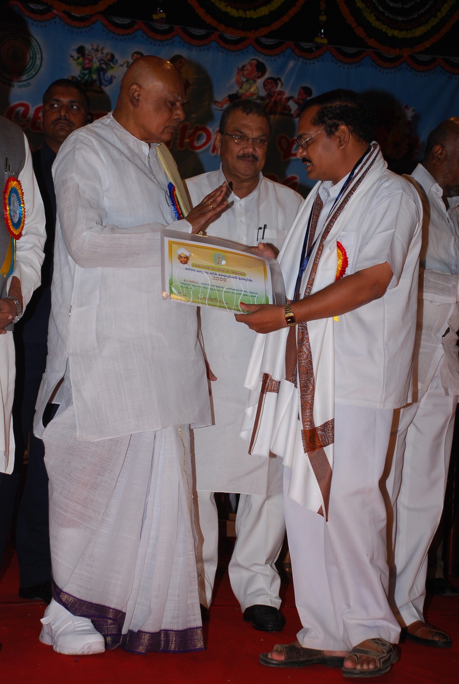 2009లో ముఖ్యమంత్రి కొణిజేటి రోశయ్యచే ఉత్తమ ఉపాధ్యాయ పురస్కారాన్ని పొందిన చంటిబాబు